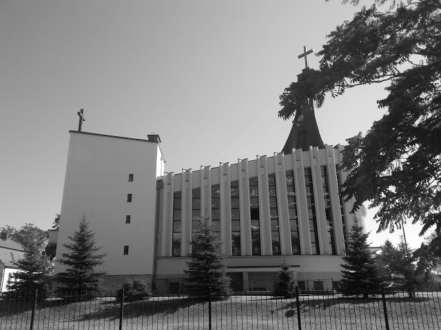 Kościół rzymskokatolicki przy ulicy Wyszyńskiego